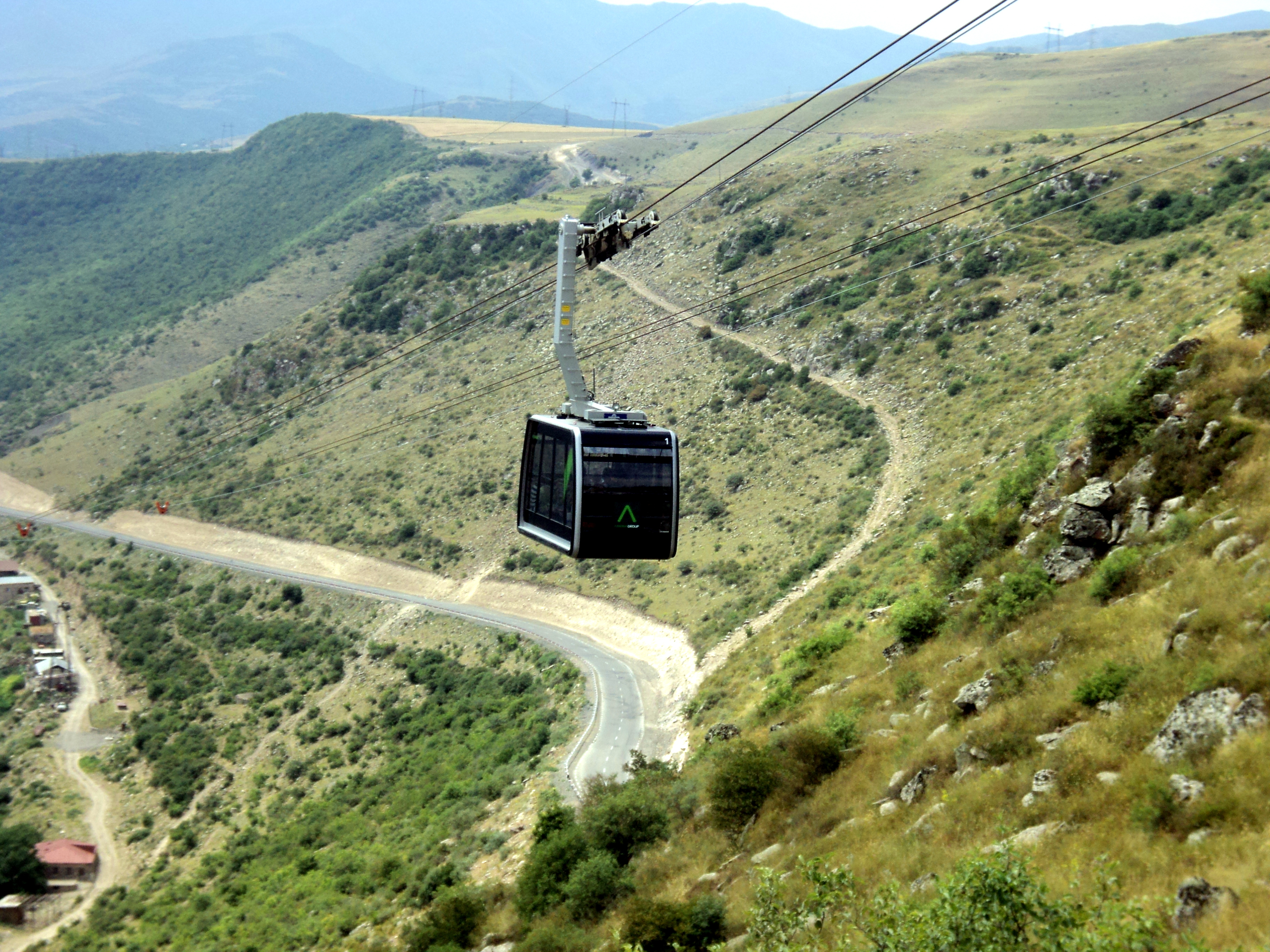 Զանգեզուրի արգելավայր, «Տաթևեր», Հալիձոր, Տաթև